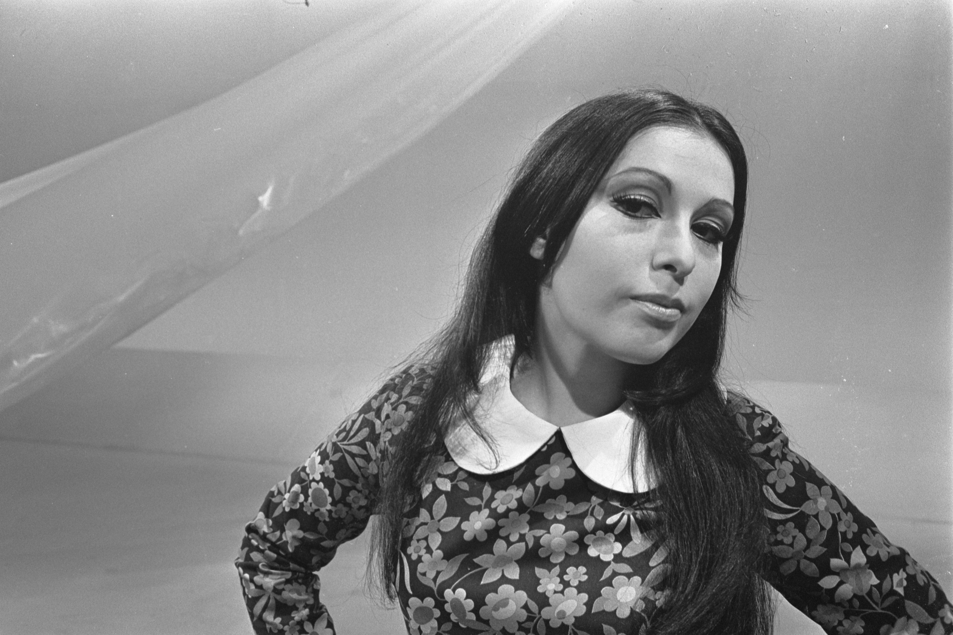 Collectie / Archief : Fotocollectie Anefo Reportage / Serie : [ onbekend ] Beschrijving : Spaanse zangeres Massiel, winnares Euro Song Festival tijdens opname in studio KRO-TV Datum : 19 april 1968 Trefwoorden : zangeressen Fotograaf : Koch, Eric / Anefo Auteursrechthebbende : Nationaal Archief Materiaalsoort : Negatief (zwart/wit) Nummer archiefinventaris : bekijk toegang 2.24.01.05 Bestanddeelnummer : 921-2650